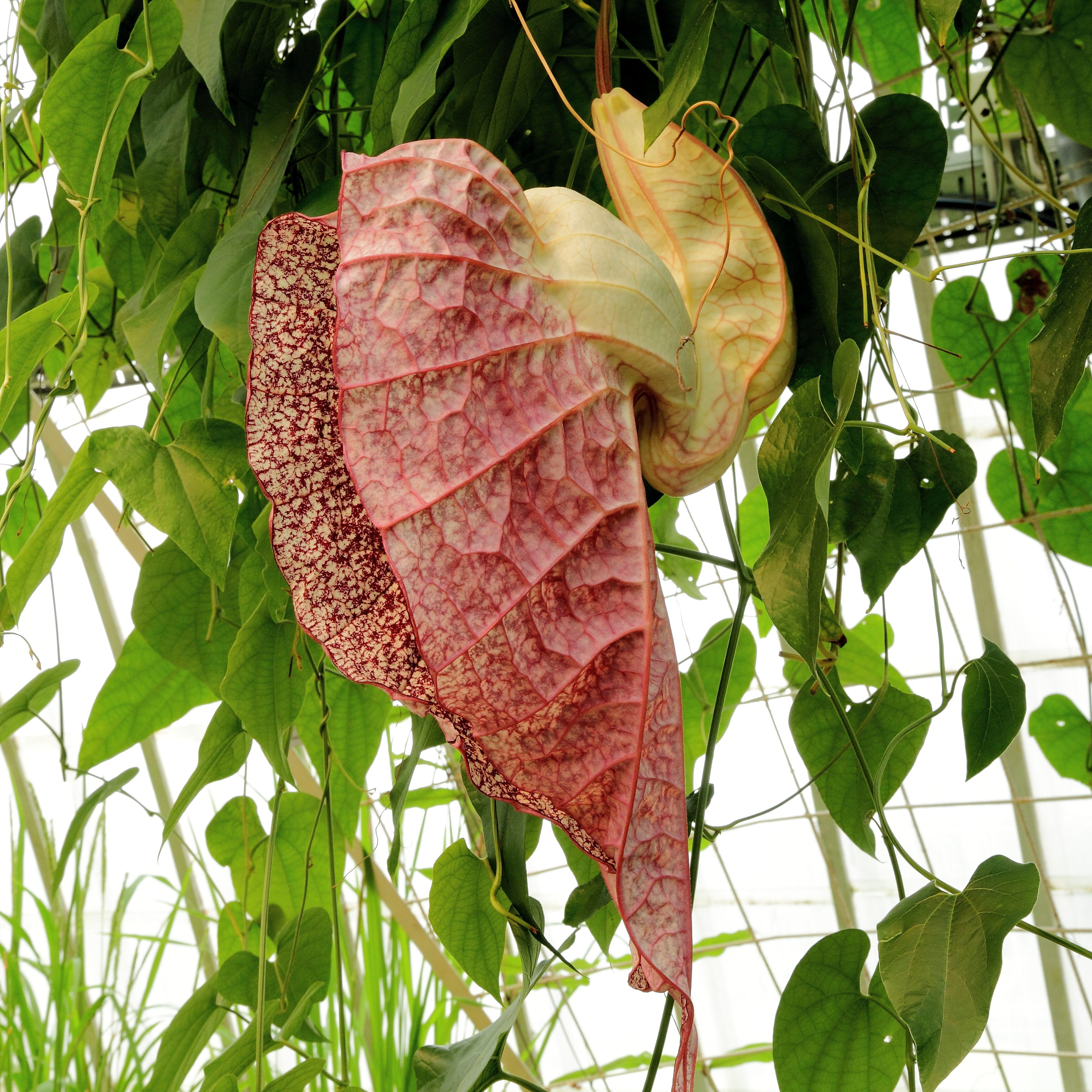 Aristolochia grandiflora i Bergianska trädgården.